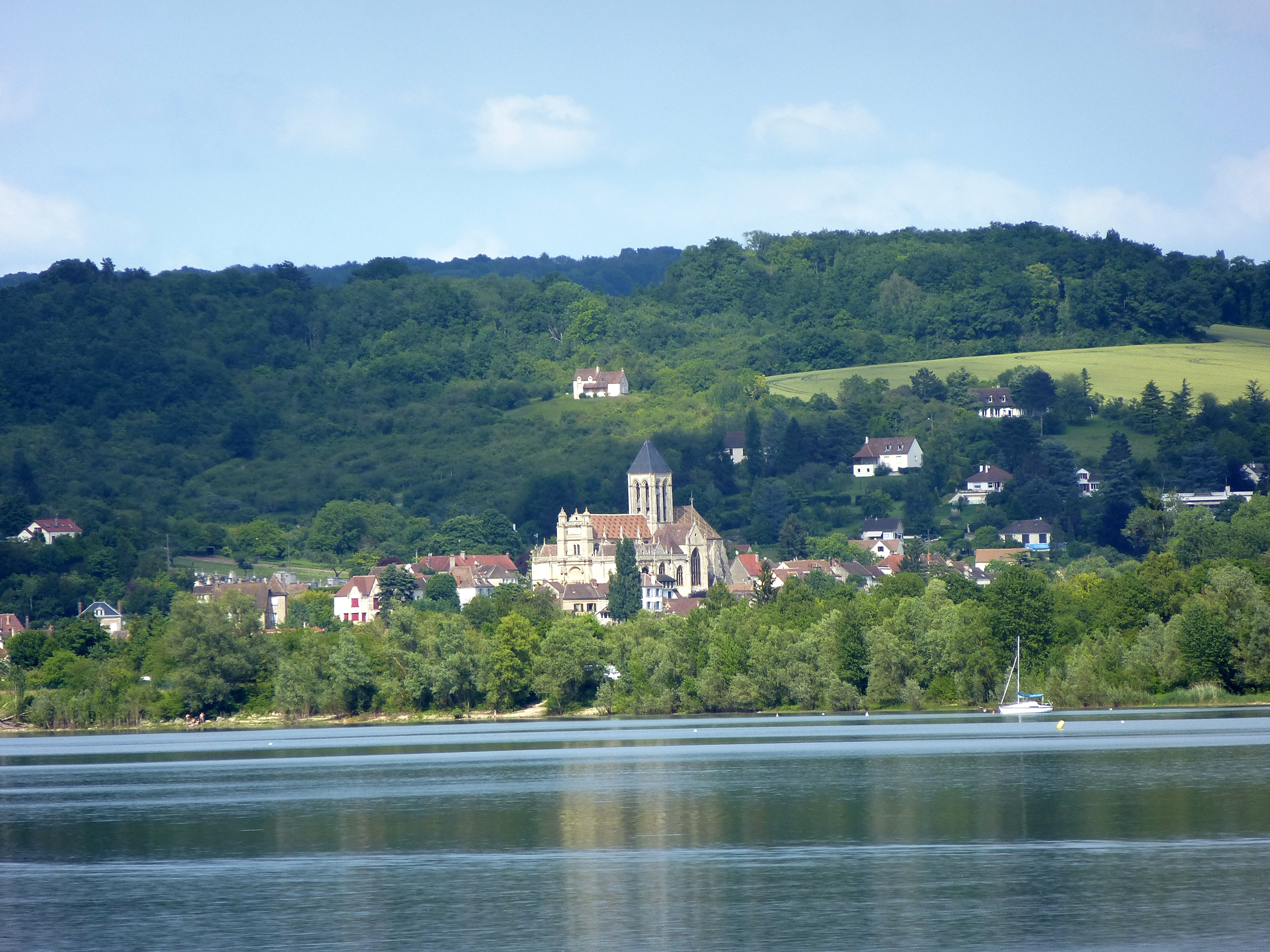 Vétheuil vu de la commune de Moisson. (Val-d'Oise, région Île-de-France).